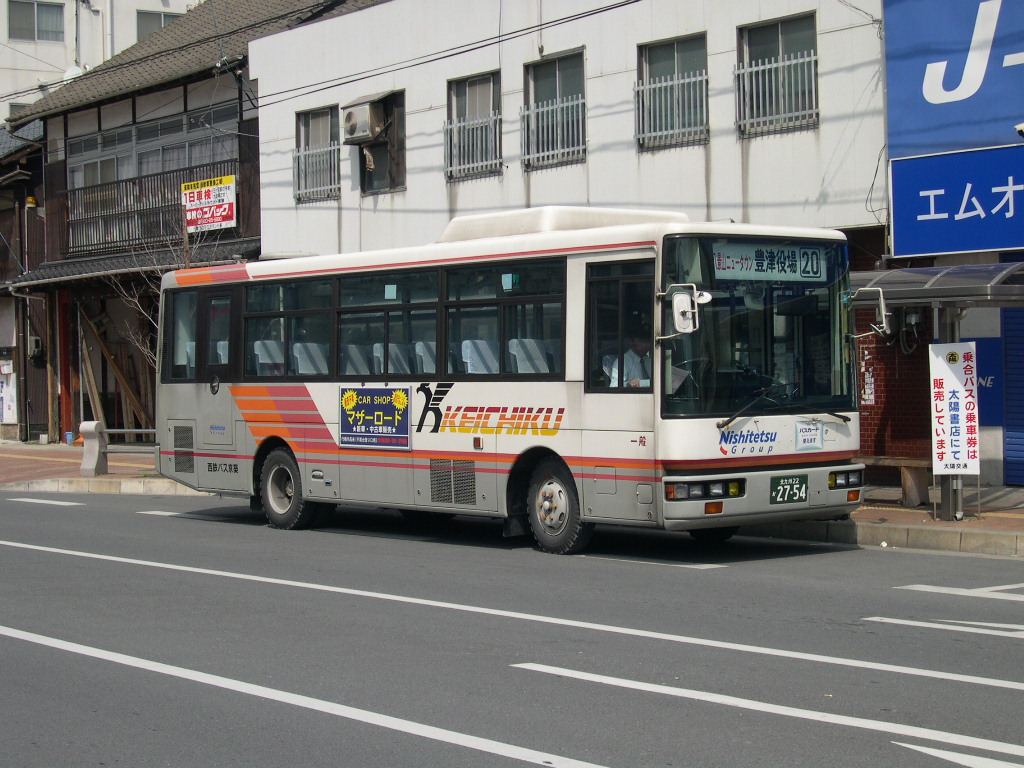 2003-3-29撮影